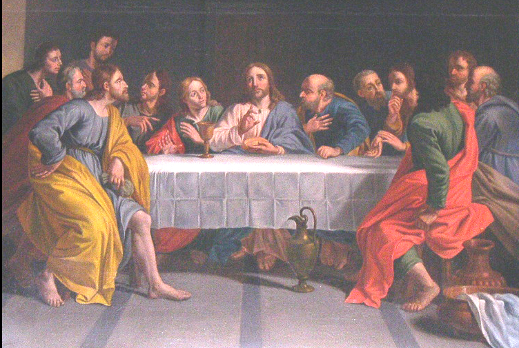 Tableau au dessus de l'autel de l'église de St Benoit des Ondes